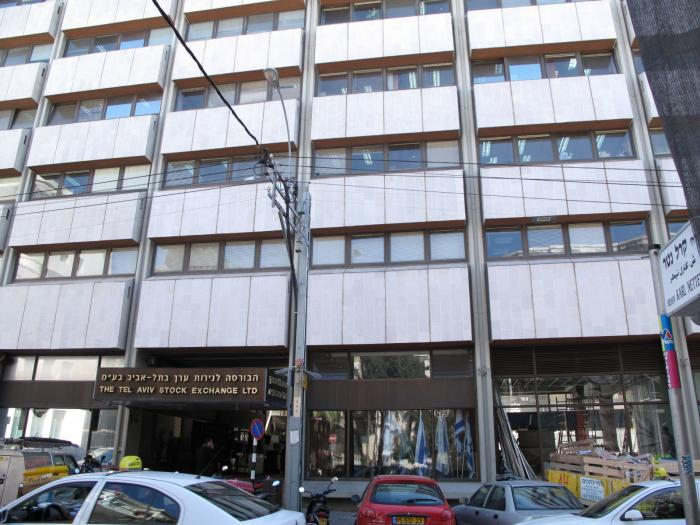 בניין הבורסה ברחוב אחד העם בתל אביב